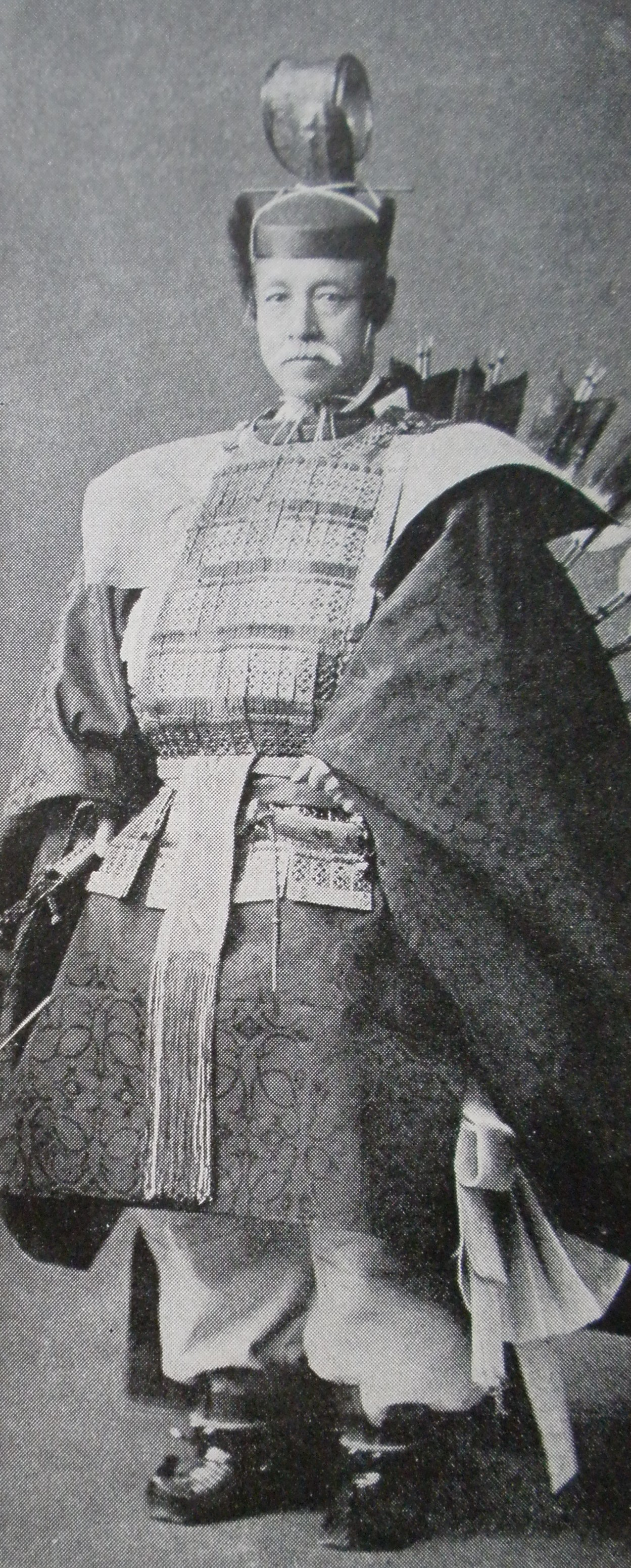 大礼使典儀官・賞勲局総裁・伯爵正親町実正